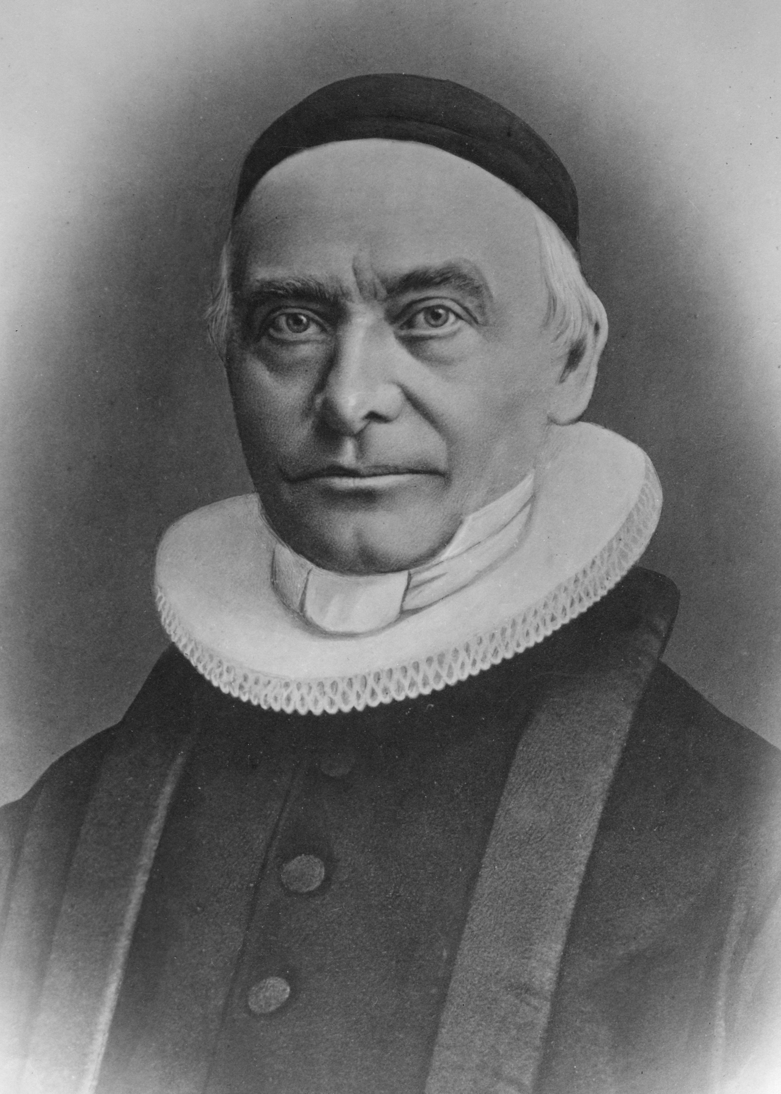 Format: Fotopositiv. Aage Schavland var residerende kapellan i Domkirken, stortingsmann og ordfører i Trondhjem i 1865.